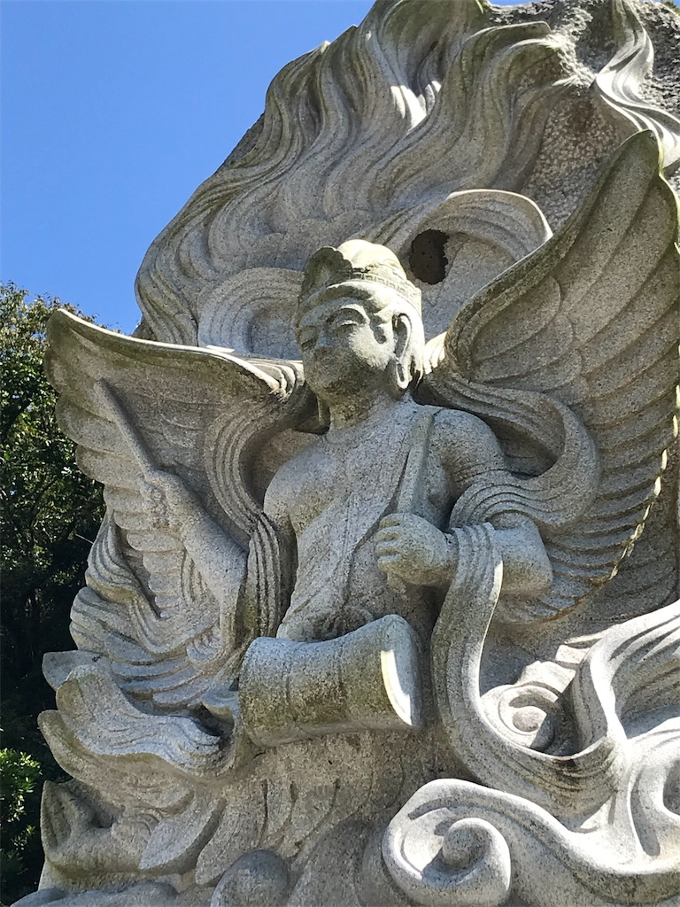 迦陵頻伽の石仏（三浦市・妙音寺）